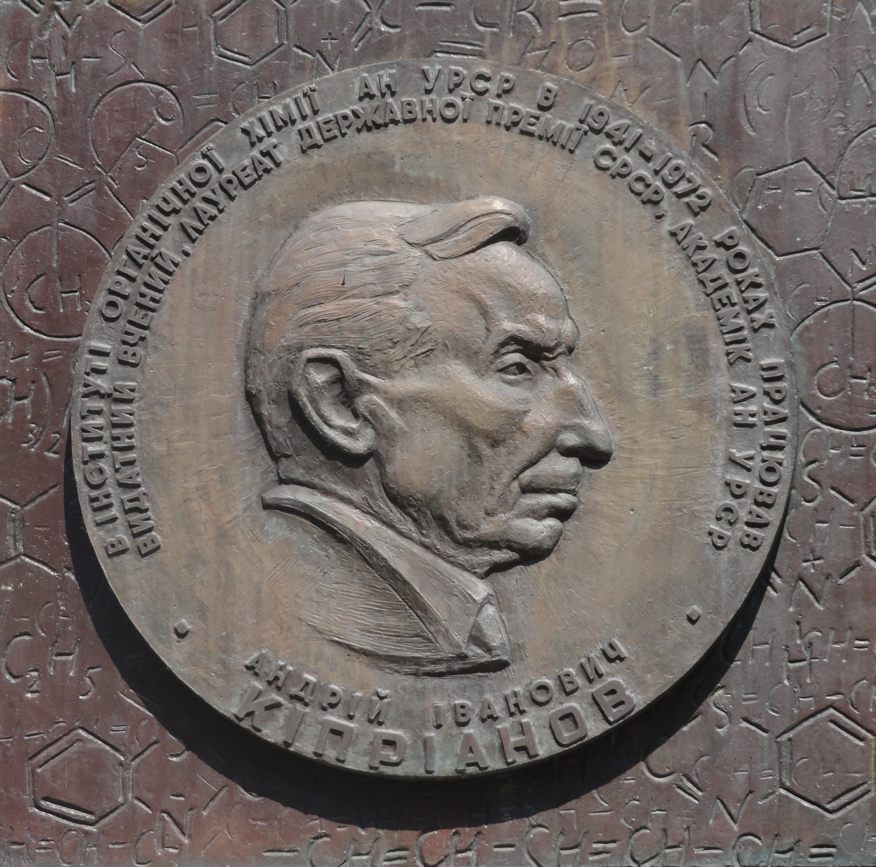 Памятная доска академику Киприанову Андрею Ивановичу установленная на территории Института Органической Химии НАН Украины. г. Киев, ул. Мурманская, 5.